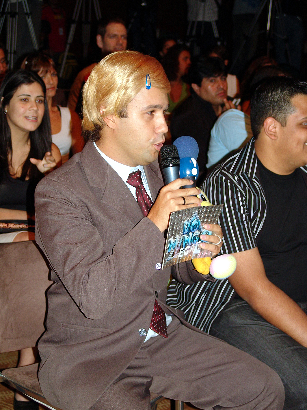 Vinícius Vieira e sua personagem "Gluglu" do programa Pânico na TV.